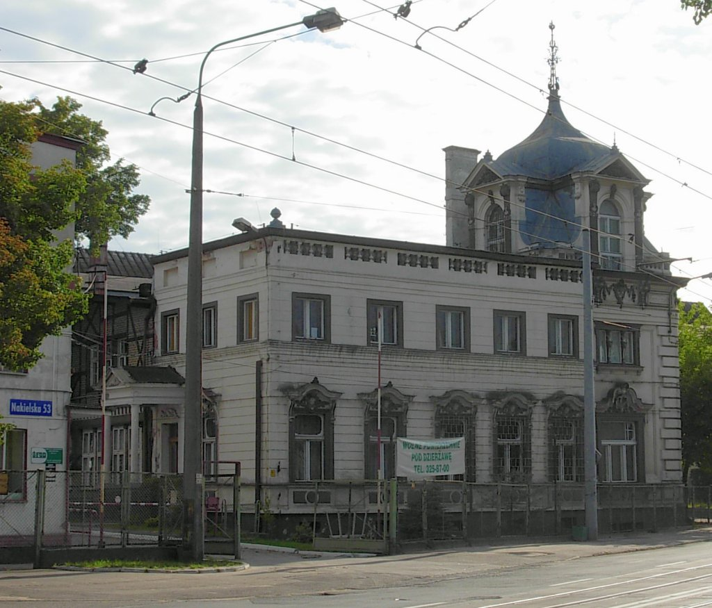 Willa Carla Blumwe w Fabryce Obrabiarek do Drewna - ul. Nakielska 53 w Bydgoszczy